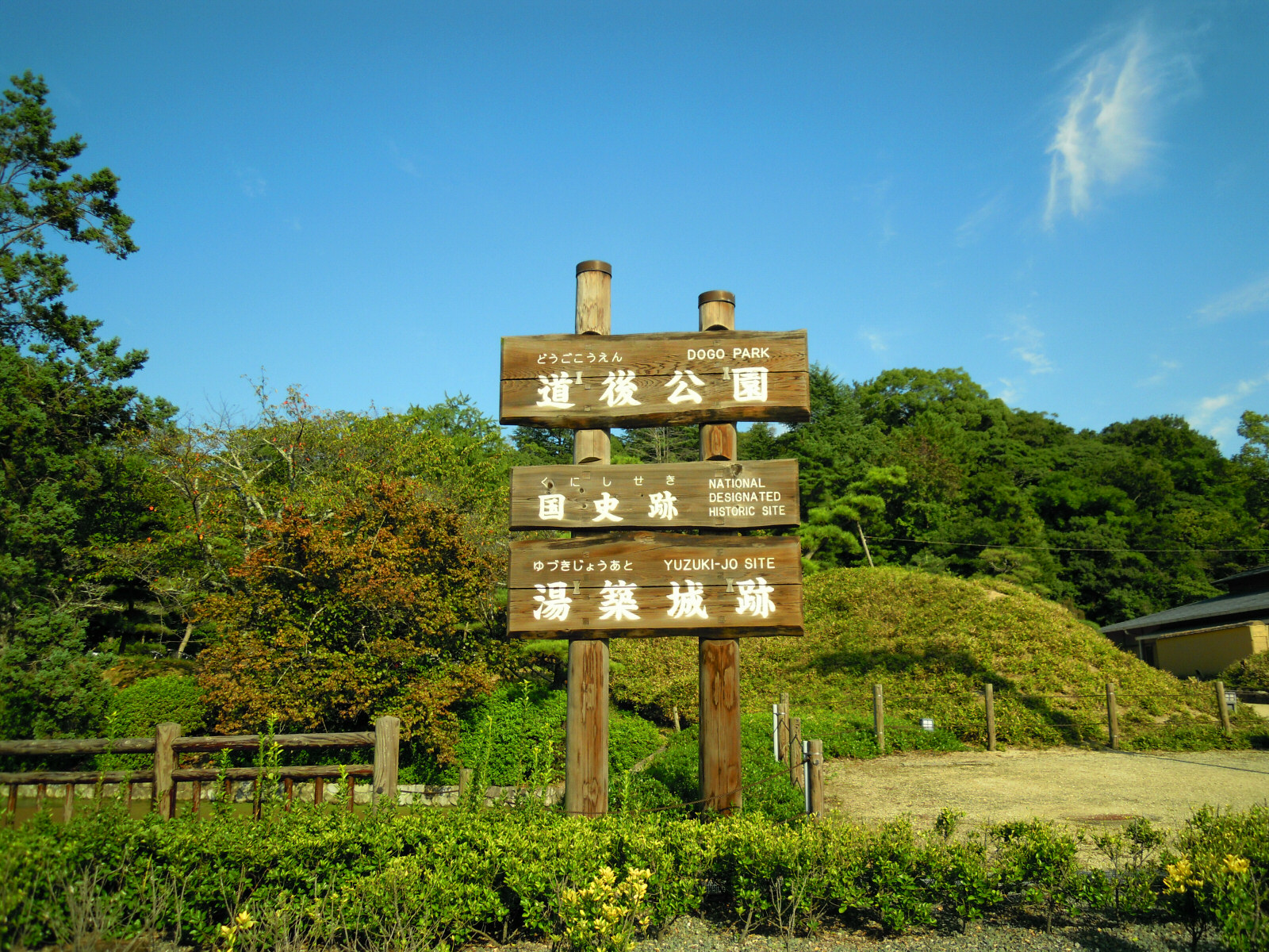 Dogokoen